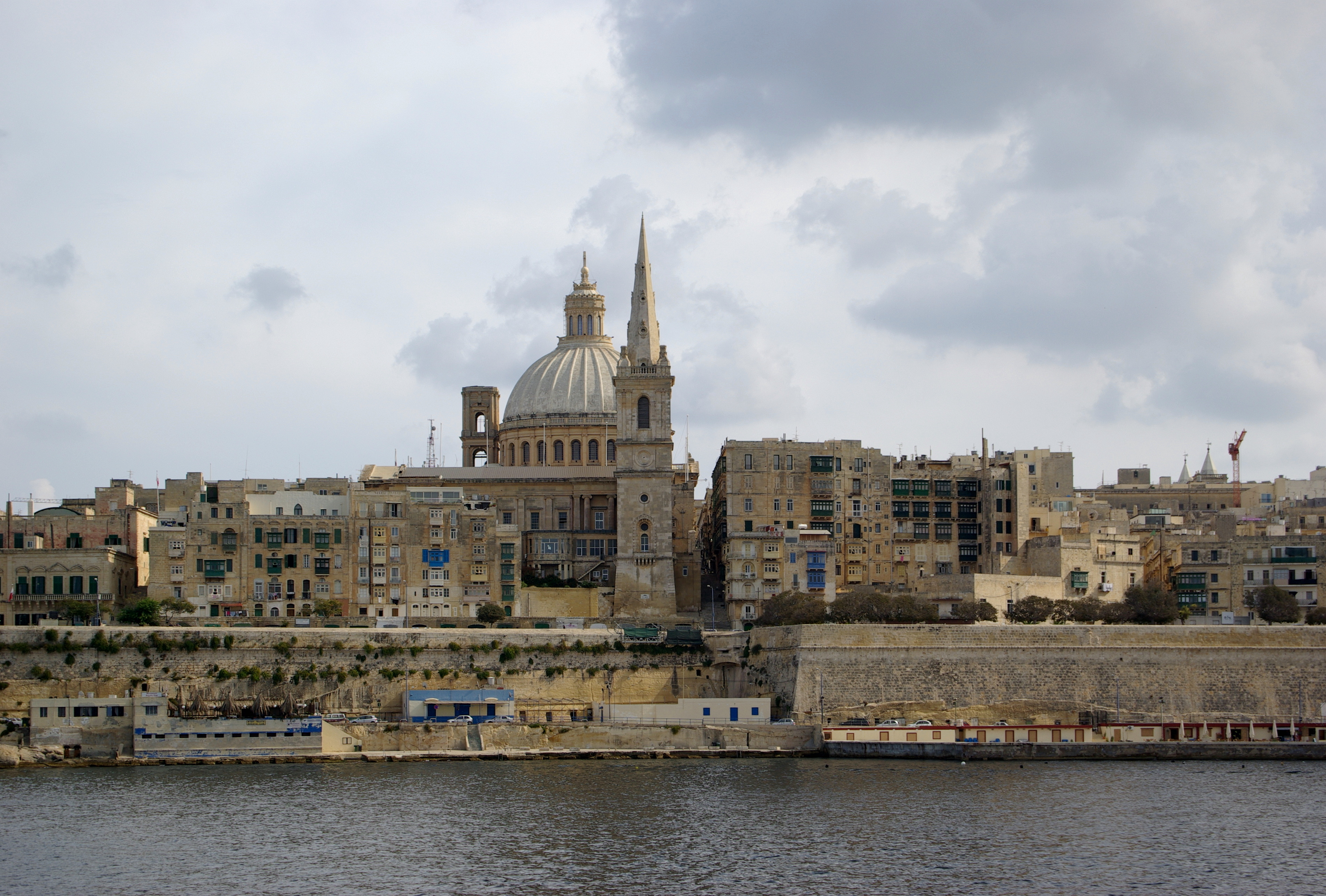 Malta, Valetta von Sliema aus gesehen